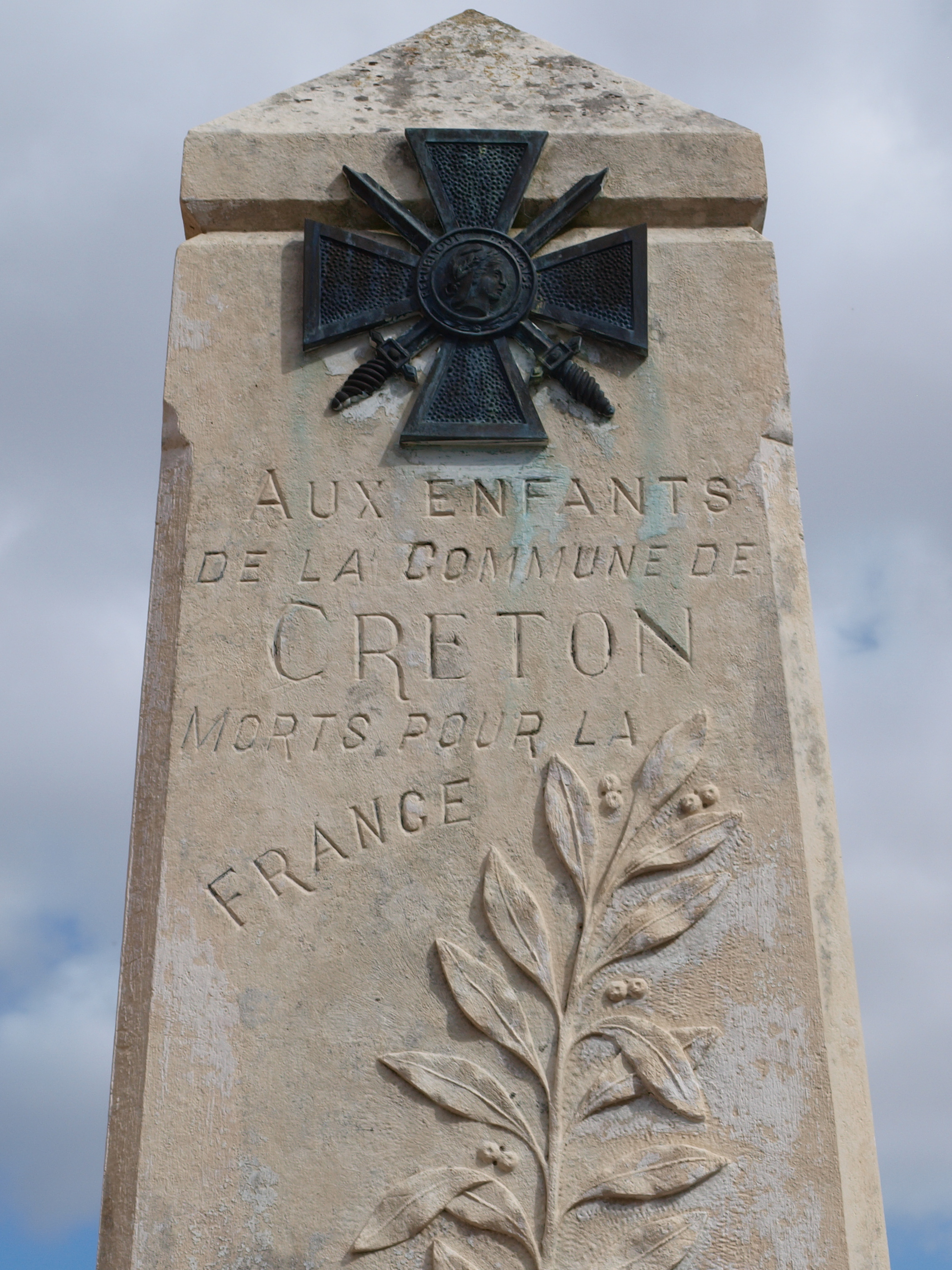 Créton (Eure, France)